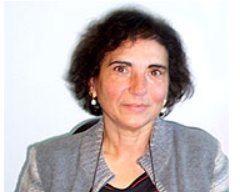 Investigadora informática. Catedrática de la Universidad a distancia UNED